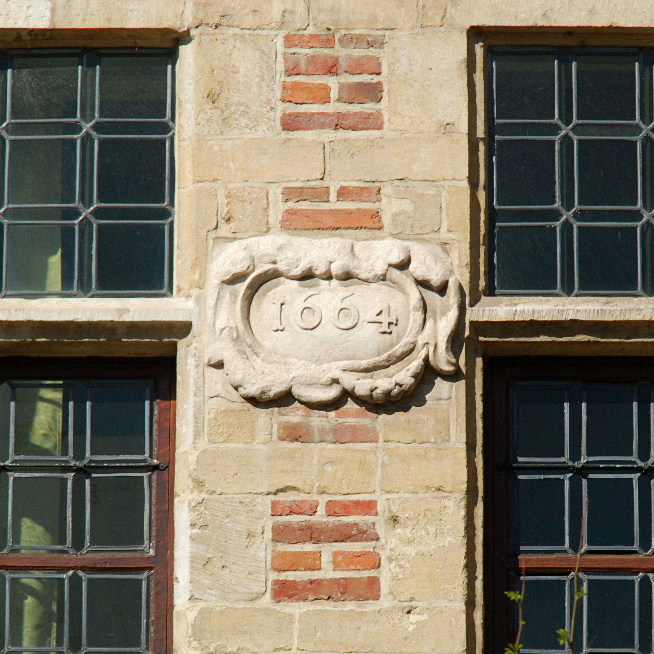 Belgium - Leuven - Groot Begijnhof - Maison Saint-Nicolas - Benedenstraat n° 59